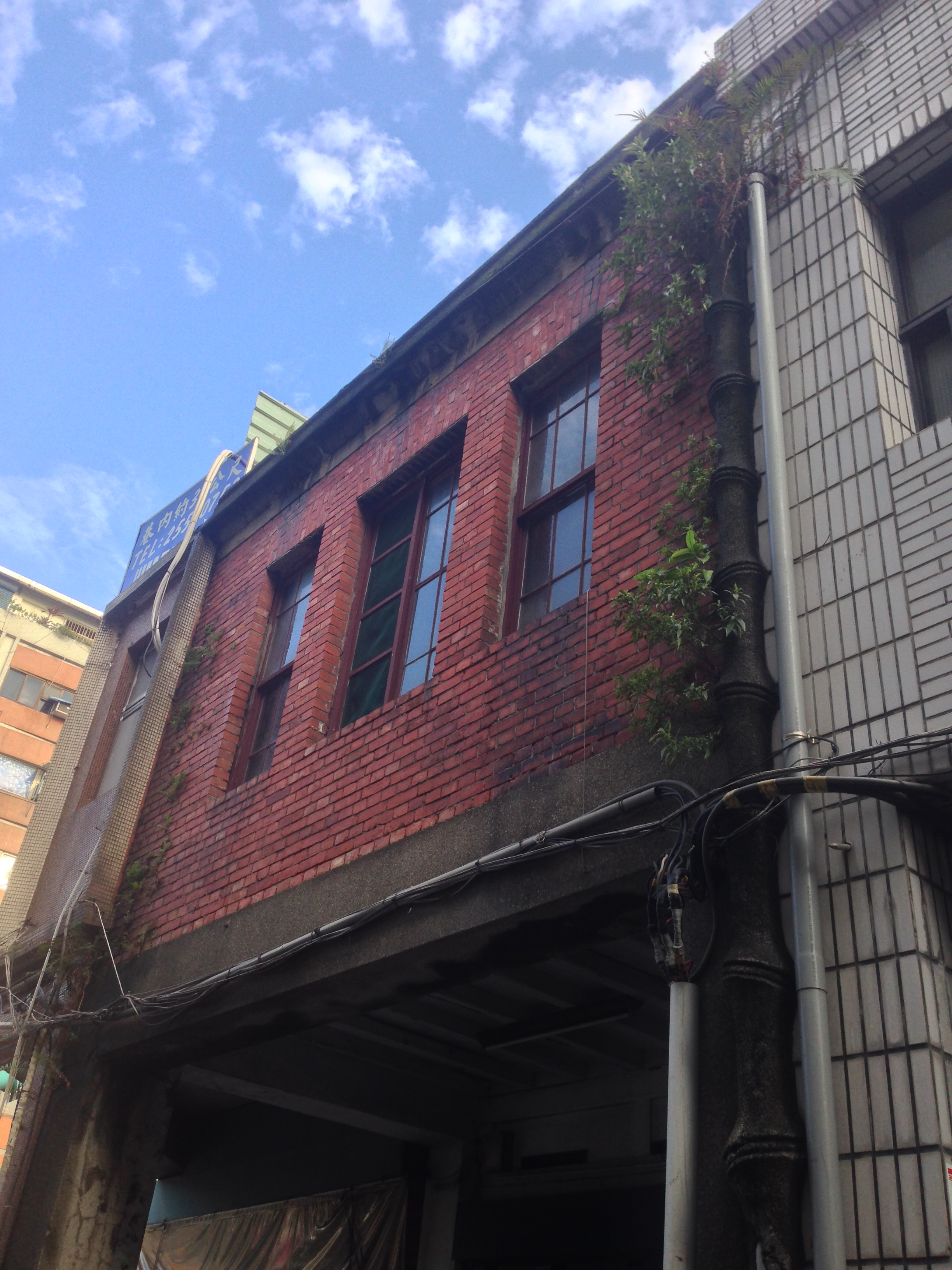 中文（台灣）: 李臨秋故居